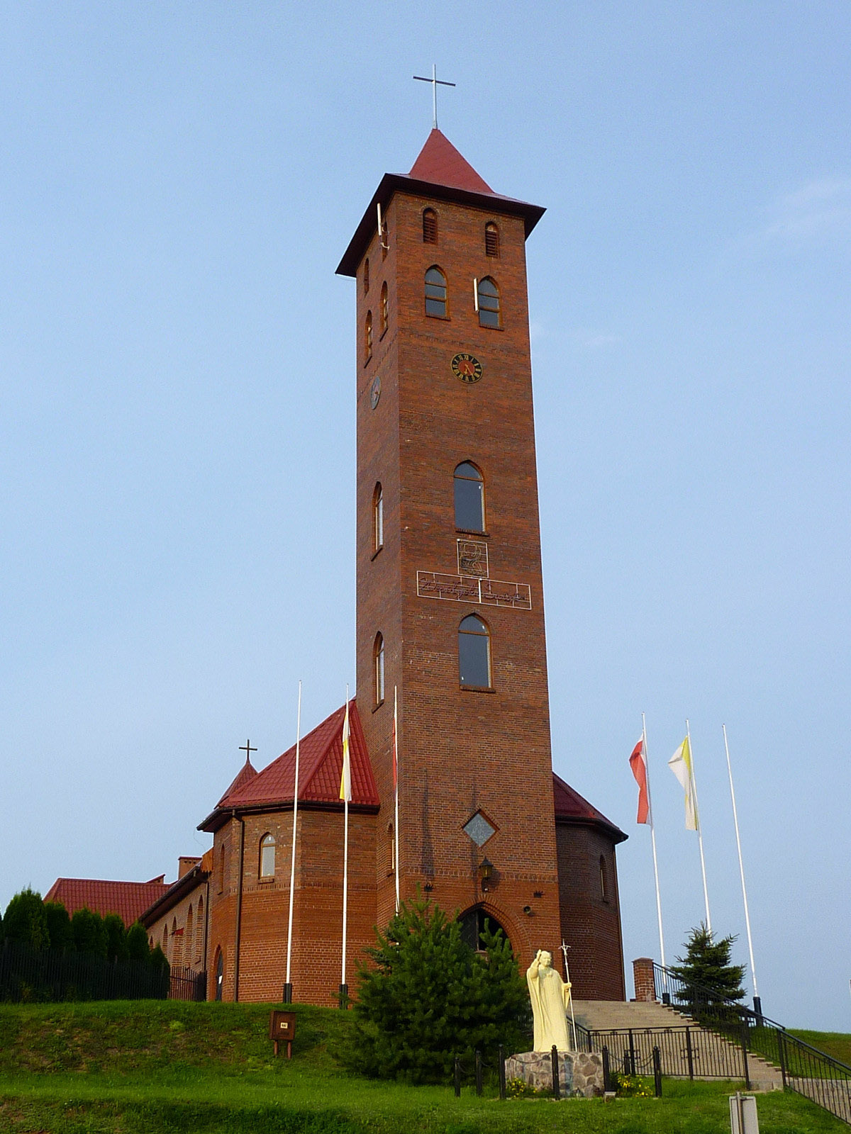 Kościół św. Mikołaja w Mikołajkach.